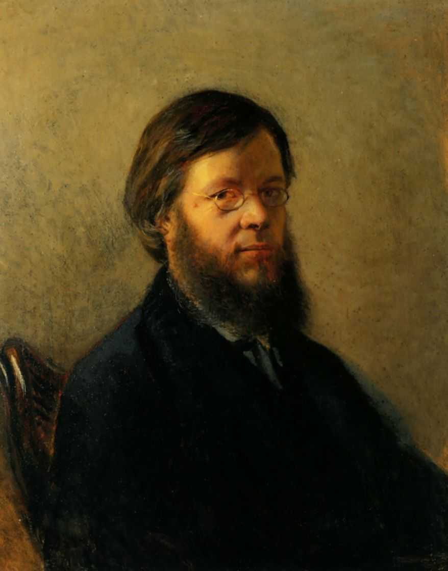 Ге Николай Николаевич. Портрет А.Н.Пыпина